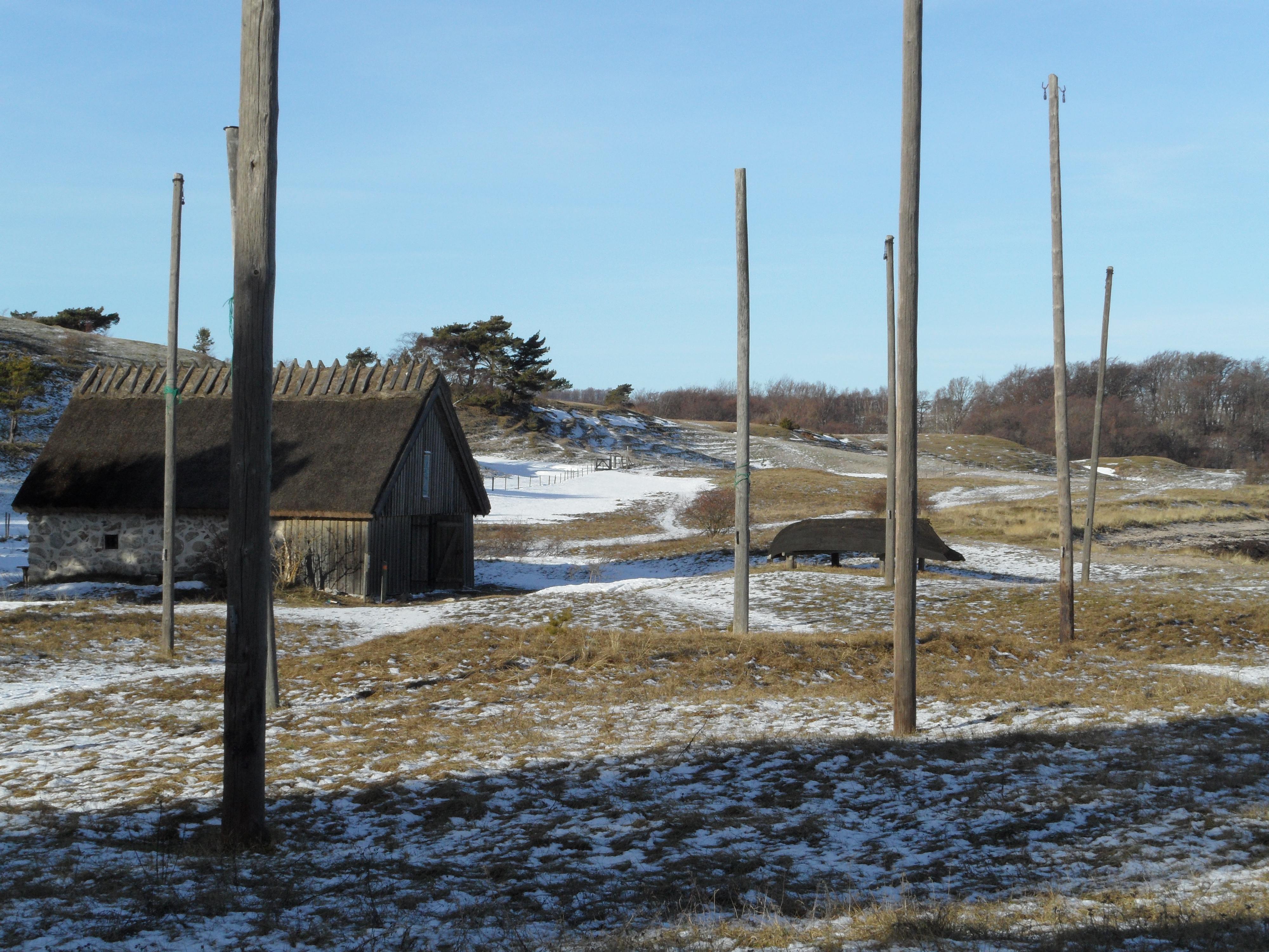 Ålboden Stenören med Lindgrens backar i bakgrunden en vinterdag